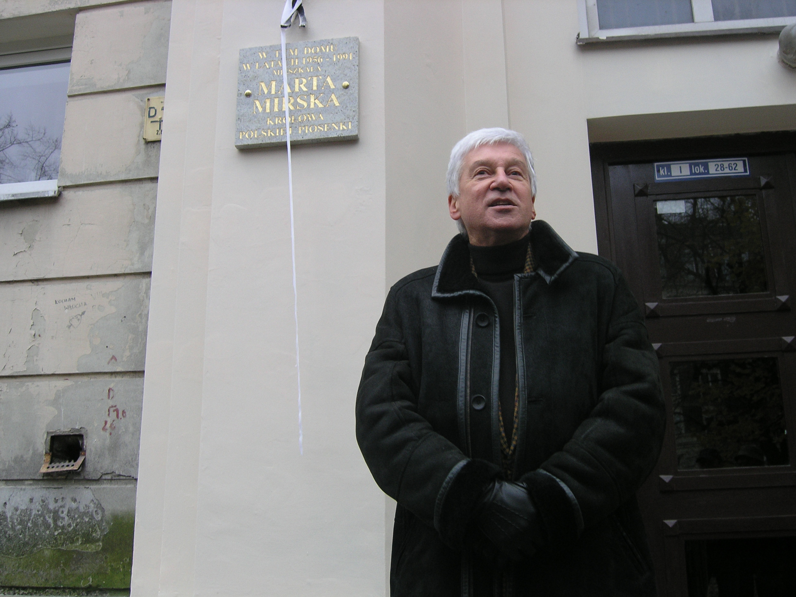 Ryszard Rembiszewski przemawiający w imieniu ZASP, podczas odsłonięcia tablicy na domu w którym mieszkała piosenkarka Marta Mirska, w Alei Wyzwolenia 9 w Warszawie , w 20 rocznicę śmierci Artystki - 15 listopada 2011